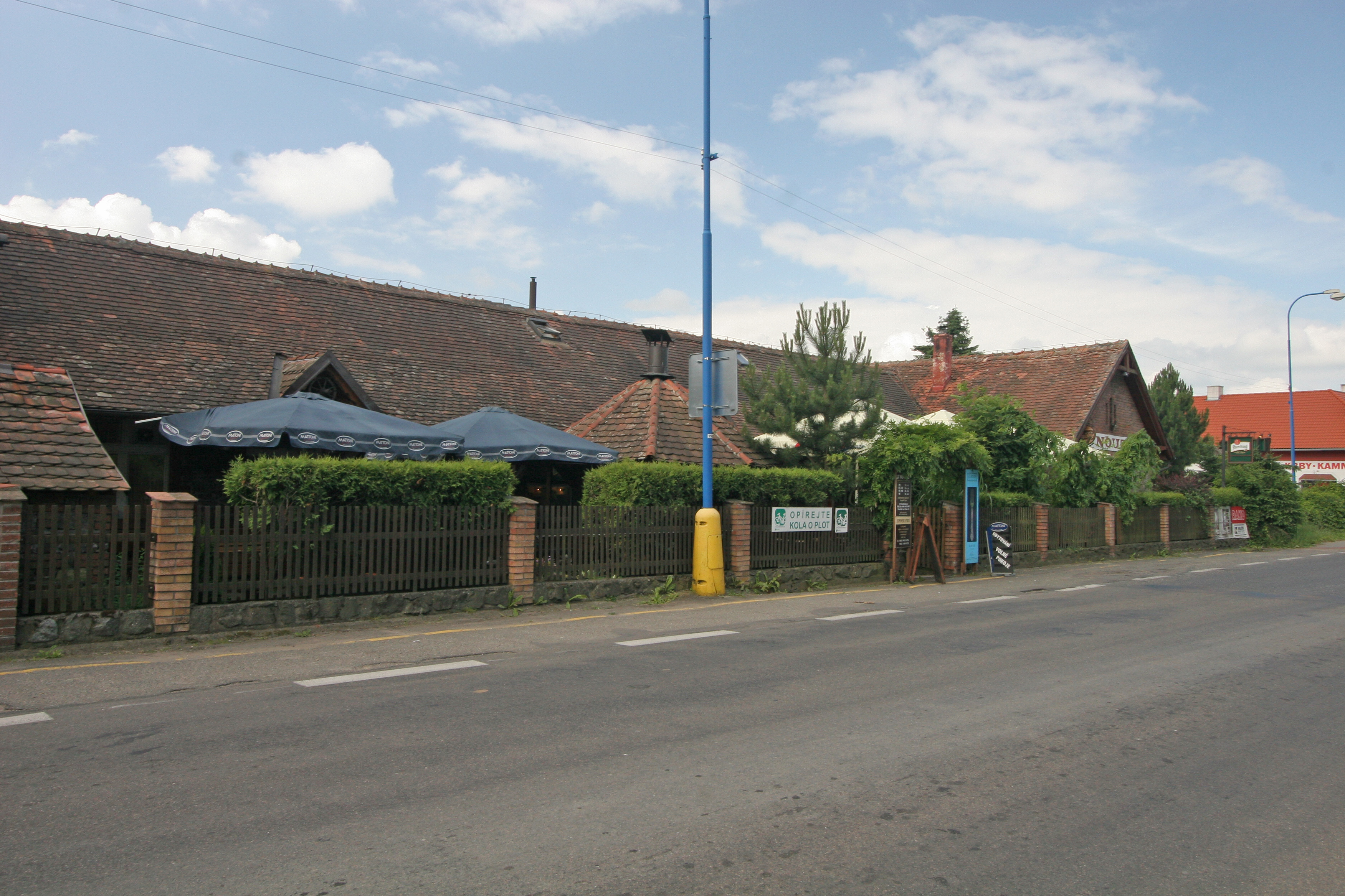 Hradiště na Písku - hostinec U Nouzů